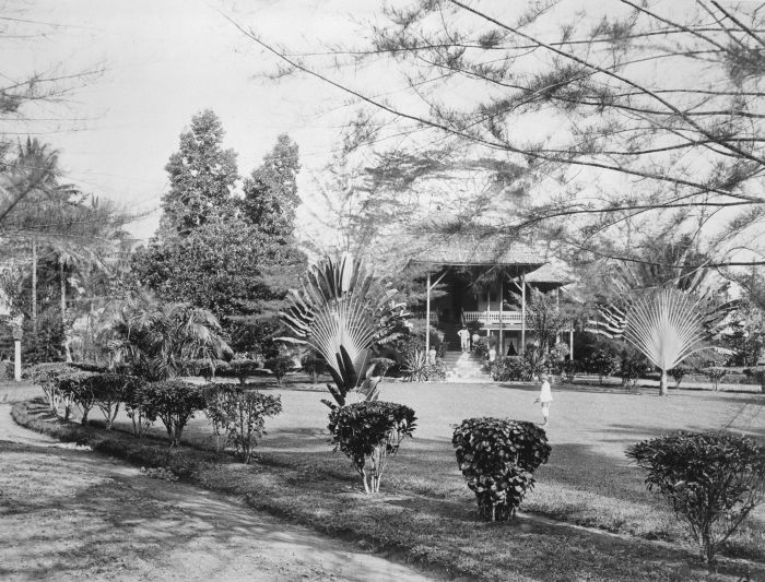 Foto. Een koloniale villa op de tabaksonderneming Tandjong Morawa, op de voorgrond een tuinjongen (kebon) aan het werk